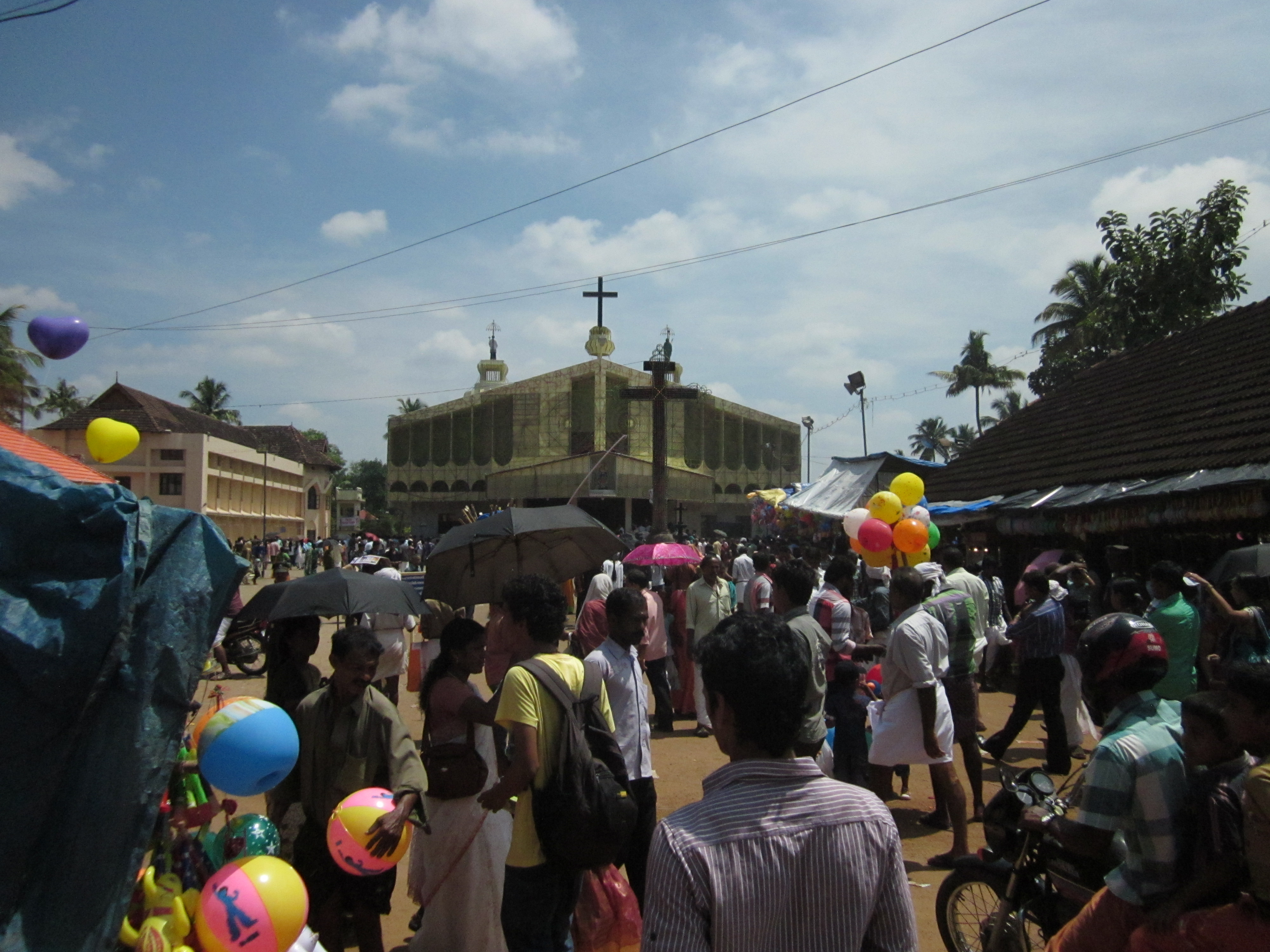 കൊരട്ടിമുത്തി തിരുനാള്‍ 2012